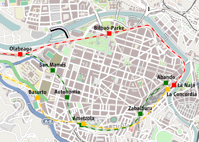 Trenbidearen Hegoaldeko Saihesbidea - Aldirien Hegoaldeko Linea Bilbon